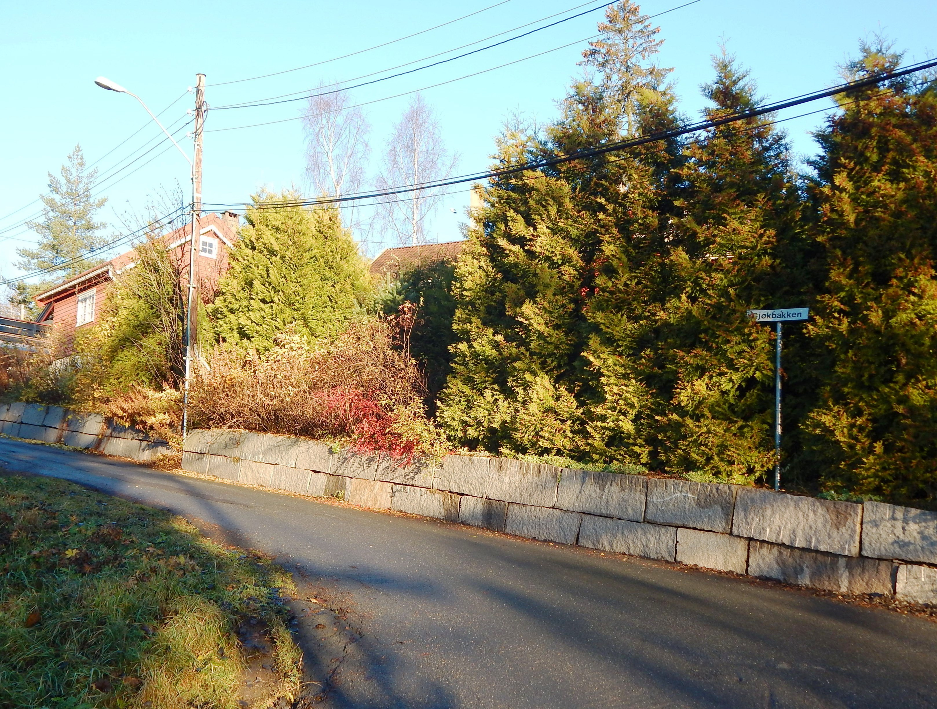 Gjøkbakken sett fra Hospitsveien